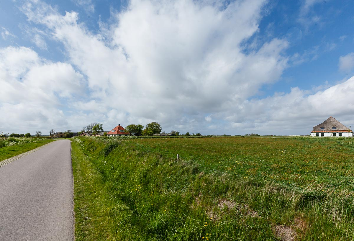 Bargen, Bargerweg, De Waal, Texel, Noord Holland, Nederland